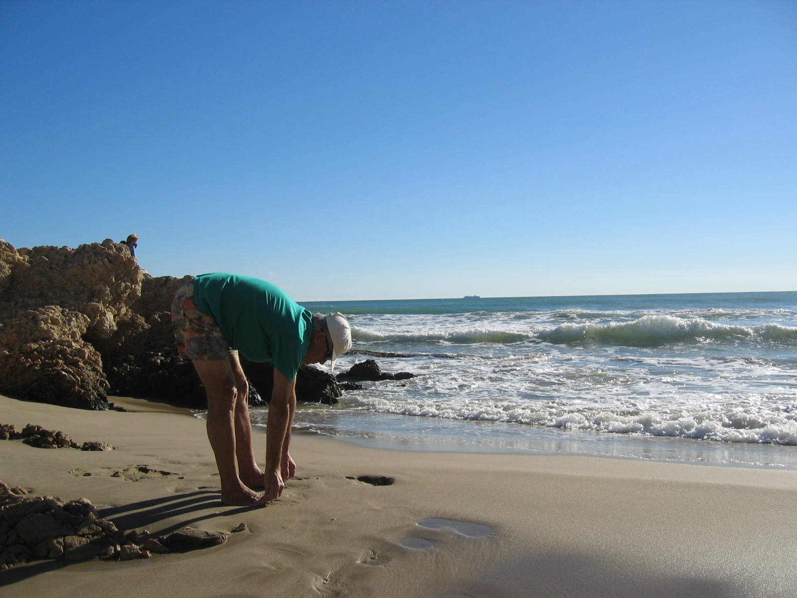 6è moviment de txi kung - Baduanjin foto meva novembre 2006 Joan Inglada Lliure ús